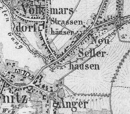 Neusellerhausen auf einem Plan von 1860